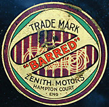 Zenith logo uit 1912